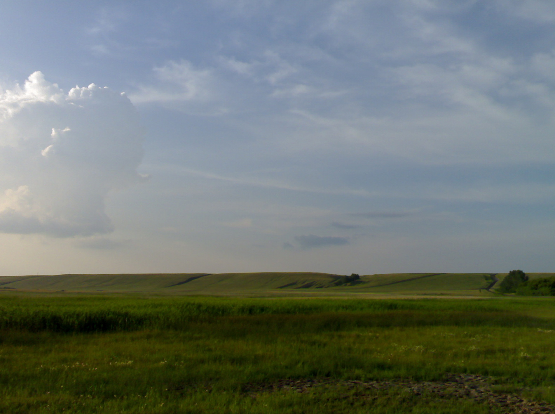 Холмы рядом с селом Афонькино